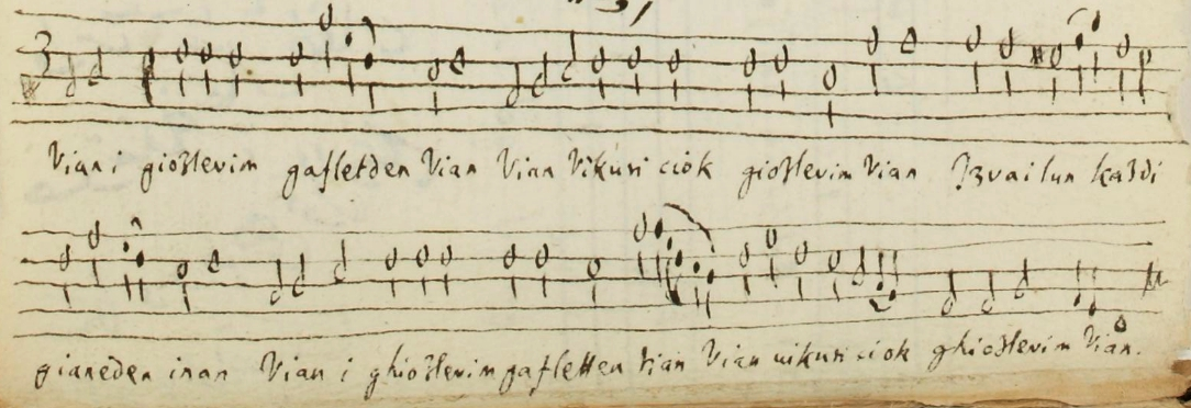 Aus der später gebundenen Loseblattsammlung Ali Ufkis. Heute in der Bibliothèque nationale de France, Département des manuscrits, Turc 292. Der Text des Liedes auf Blatt 298r stammt von dem osmanischen Sultan Murad III. Der Komponist ist unbekannt.